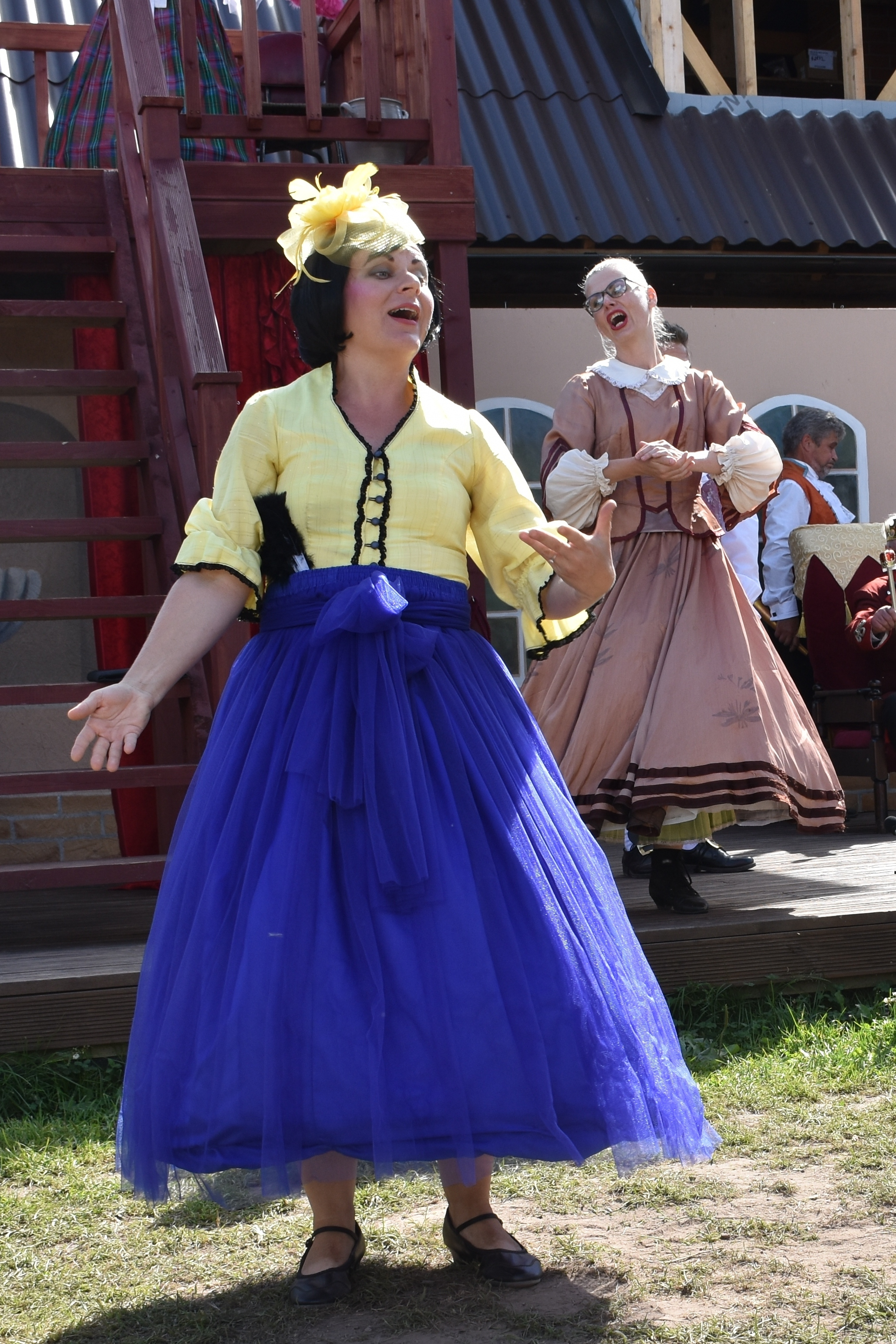 Õuedaam Tamara lavastuses "Printsess Moon"